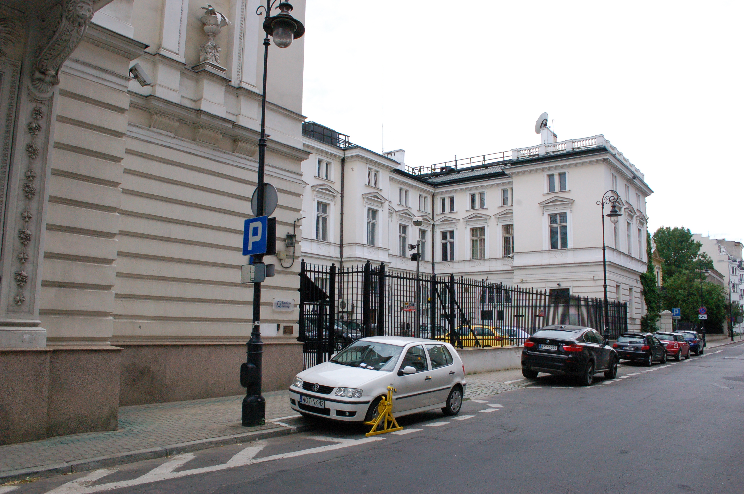 Warschau, Wielopolski Palast